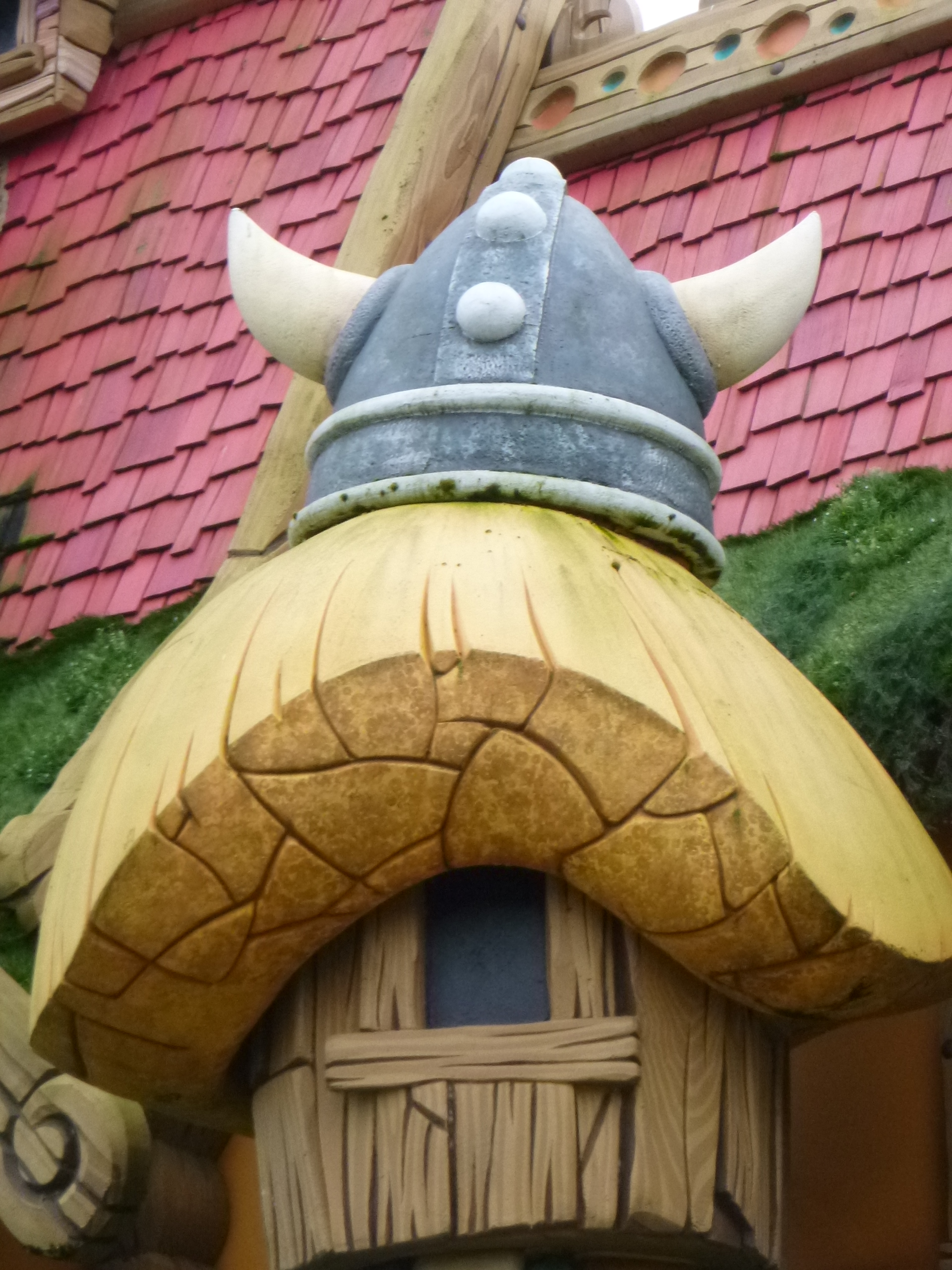 Wickieland à Plopsaland